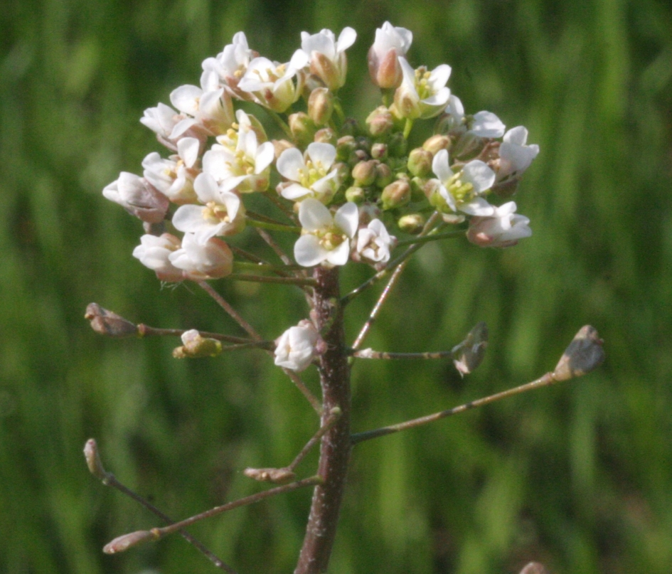 Capsella bursa-pastoris